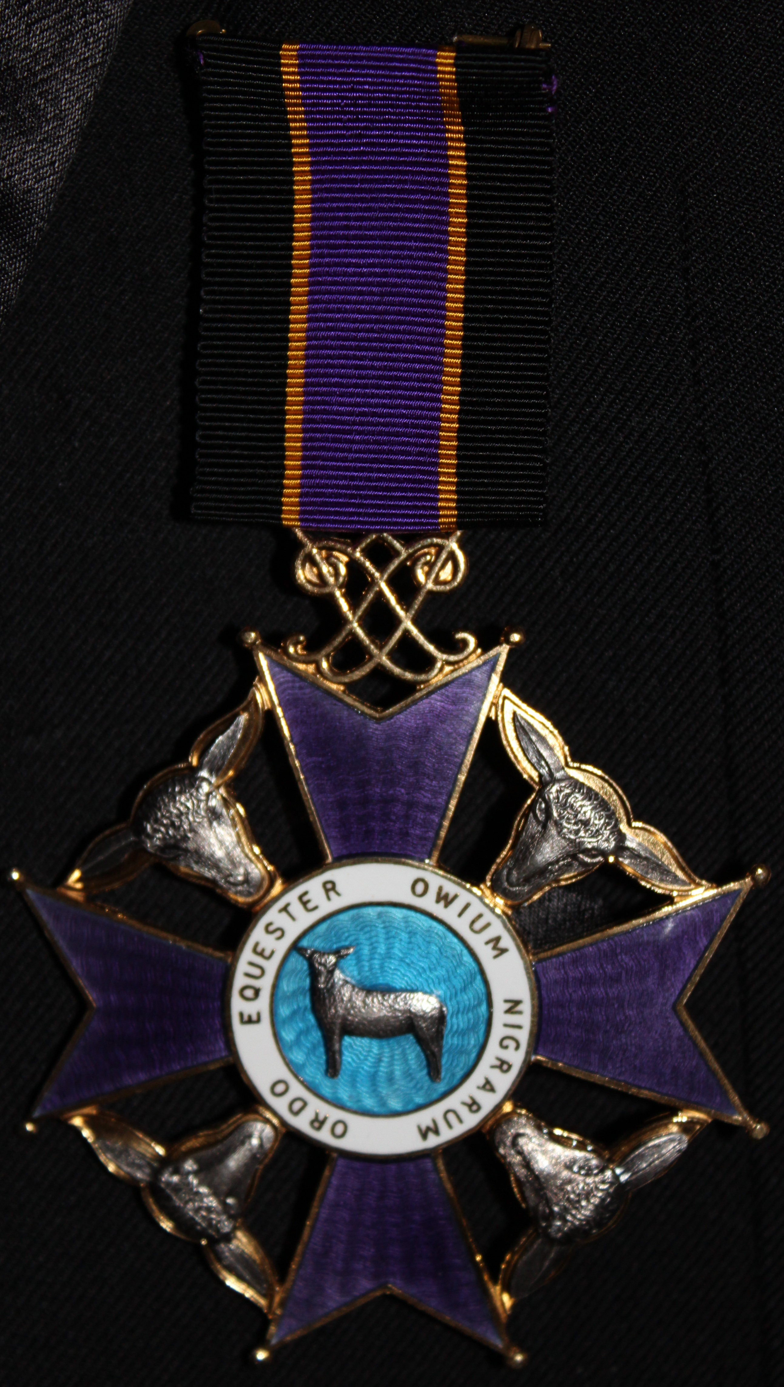 Ordenstegn for Lamberiddere (laveste grad) av studentordenen De Sorte Faars Ridderskab, tilknyttet Studentersamfundet i Trondhjem.